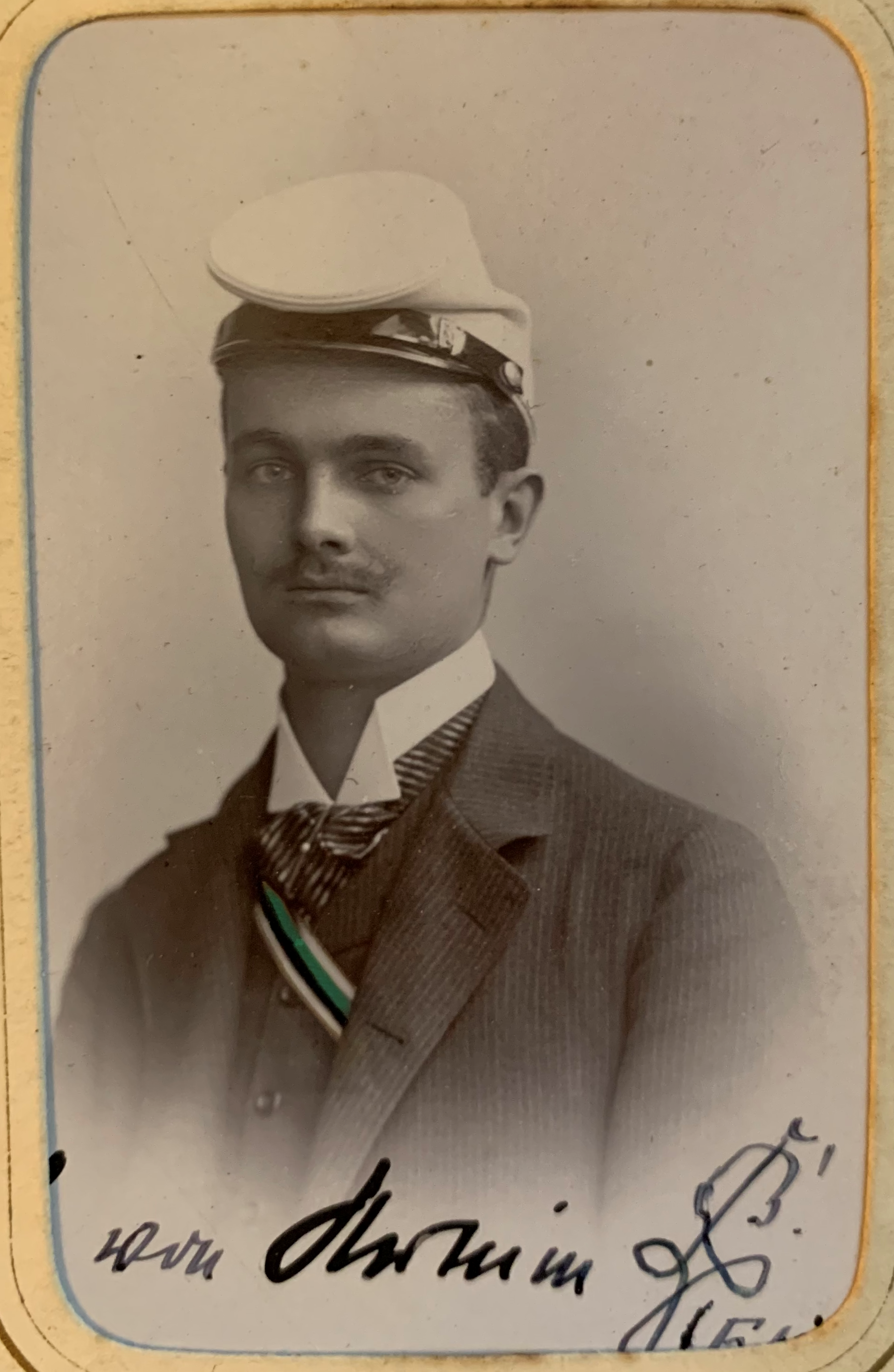 Porträtfotografie von Wilhelm von Arnim-Lützlow